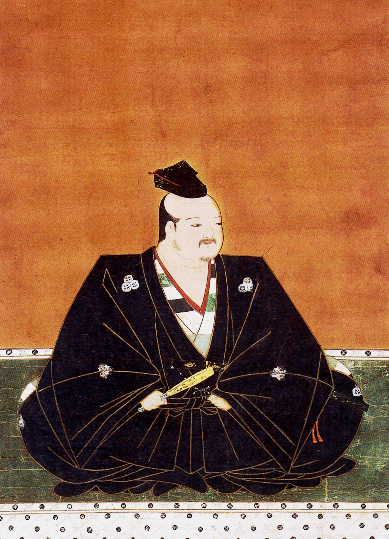 浅井長政像（部分）